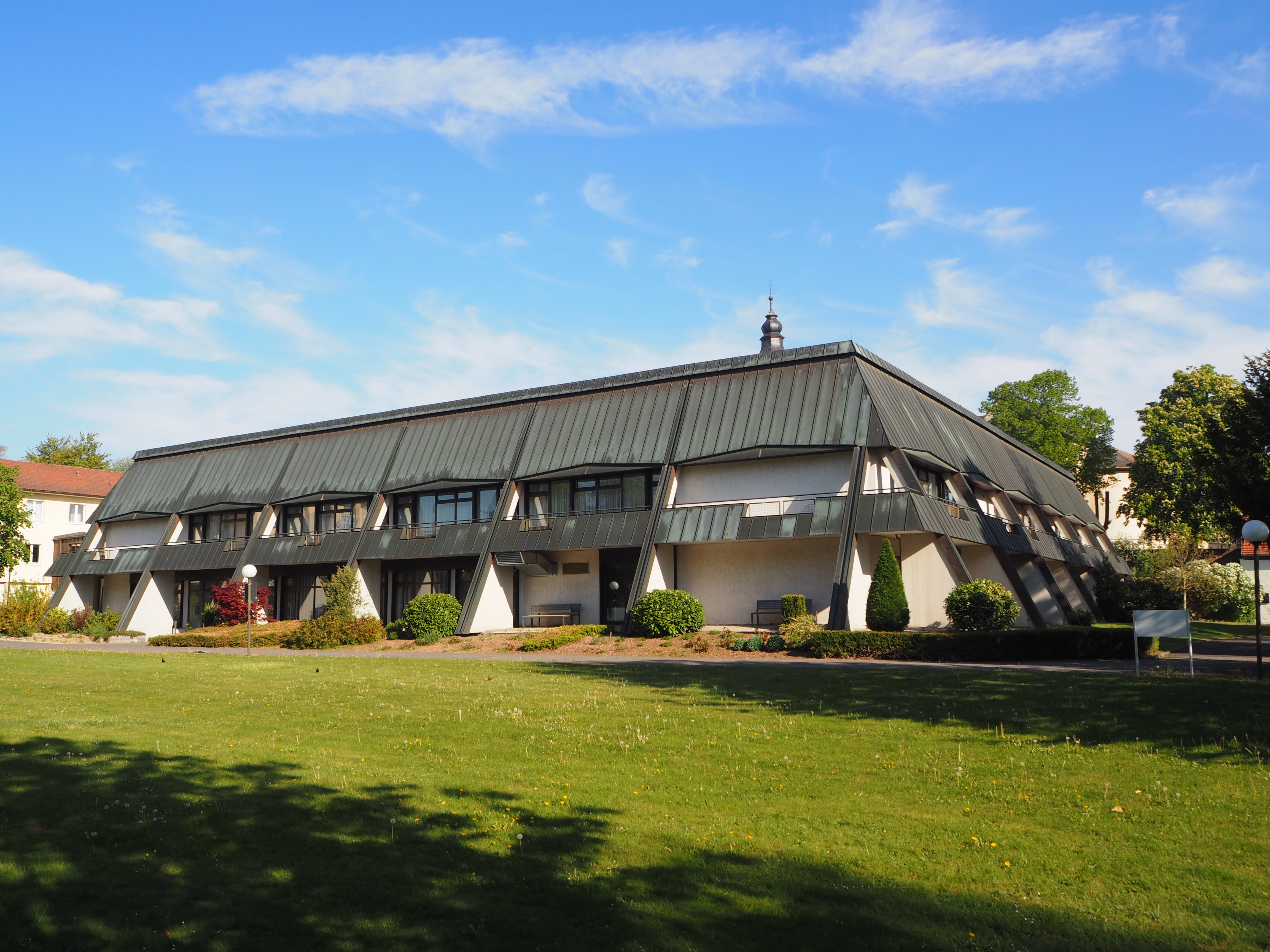 Der Neubau des Bonifatiushauses, Ansicht vom Park